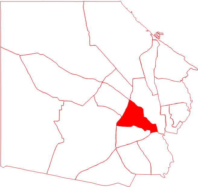 Ubicación de la parroquia Cacique Mara en el municipio Maracaibo